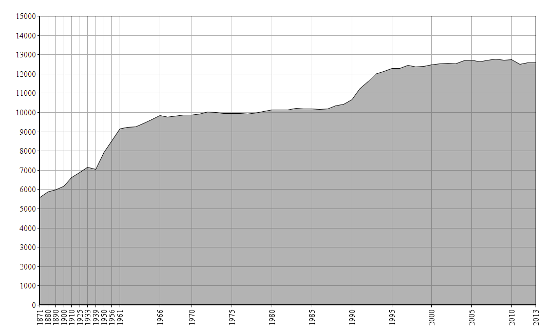 Dieses Bild zeigt die Bevölkerungsstatistik von Friesenheim